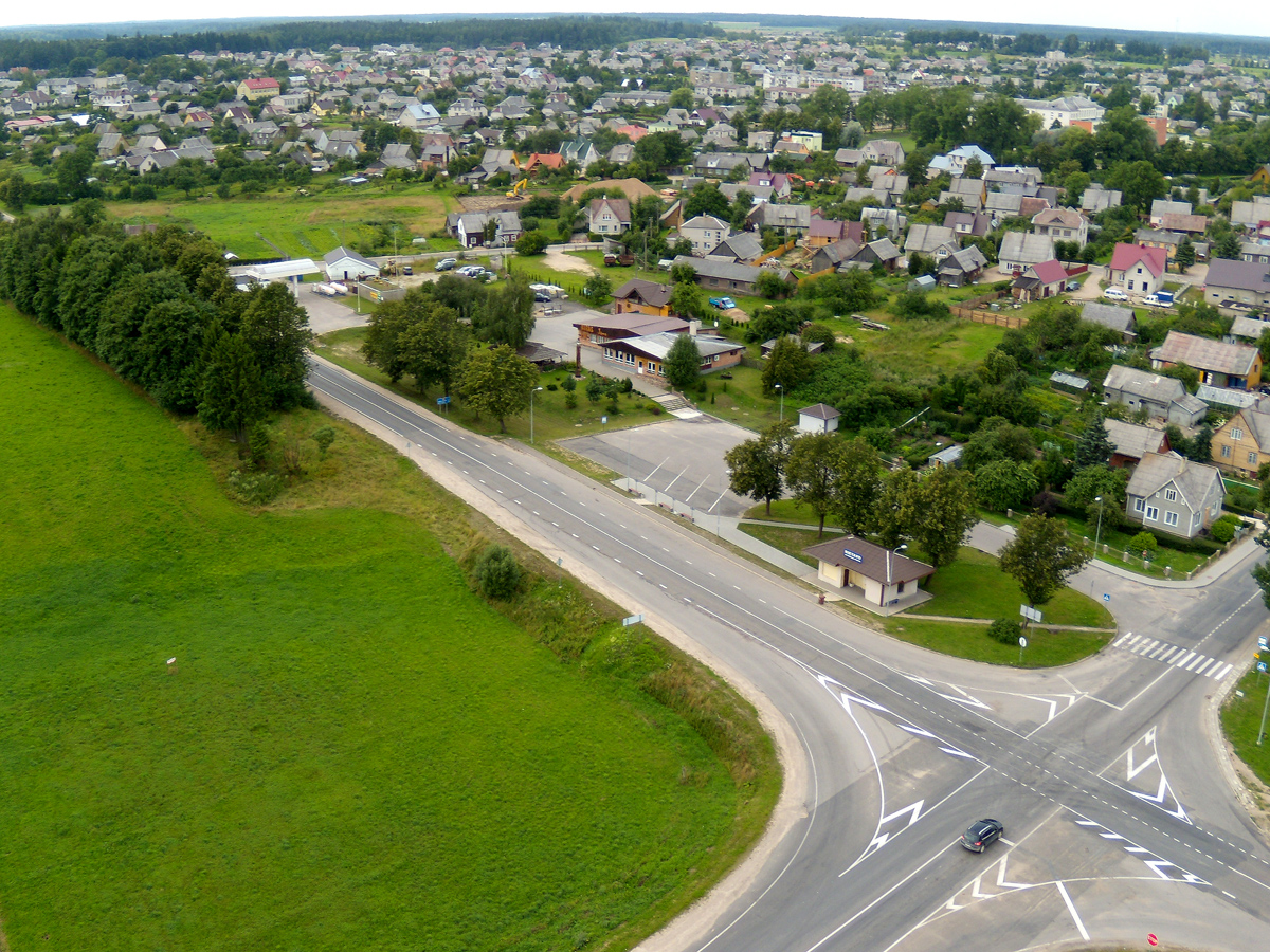 Rietavo sankryža